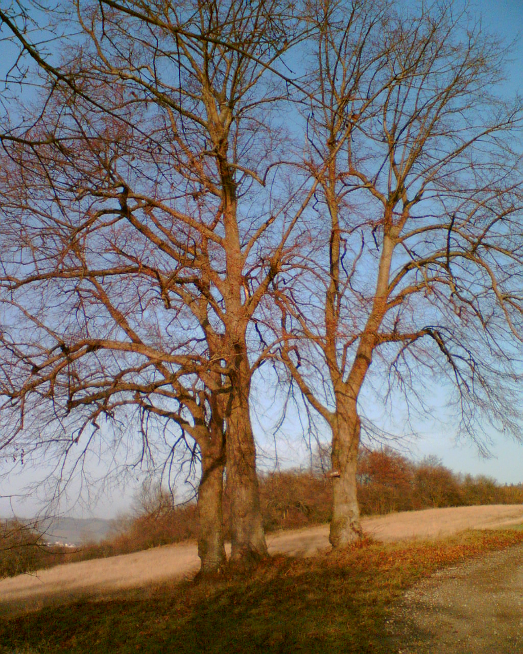 Baumgruppe nahe Dassel, Germany